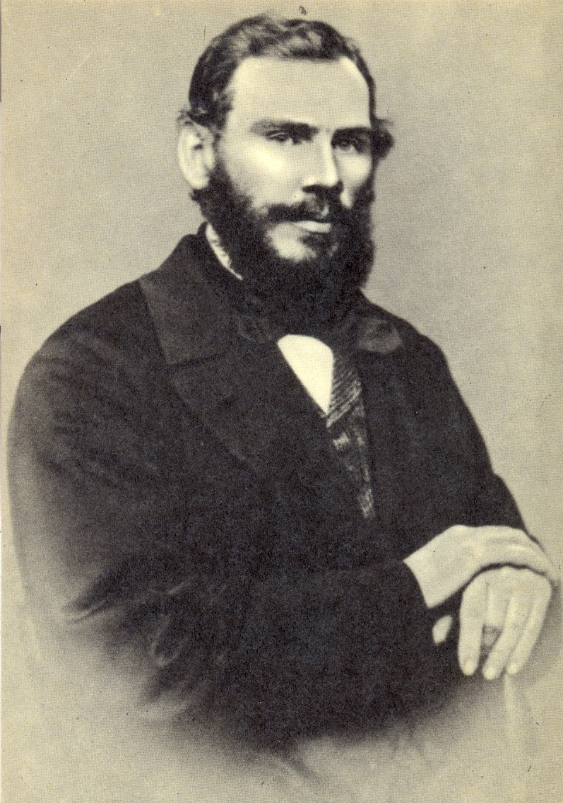 Л. Н. Толстой - жених.